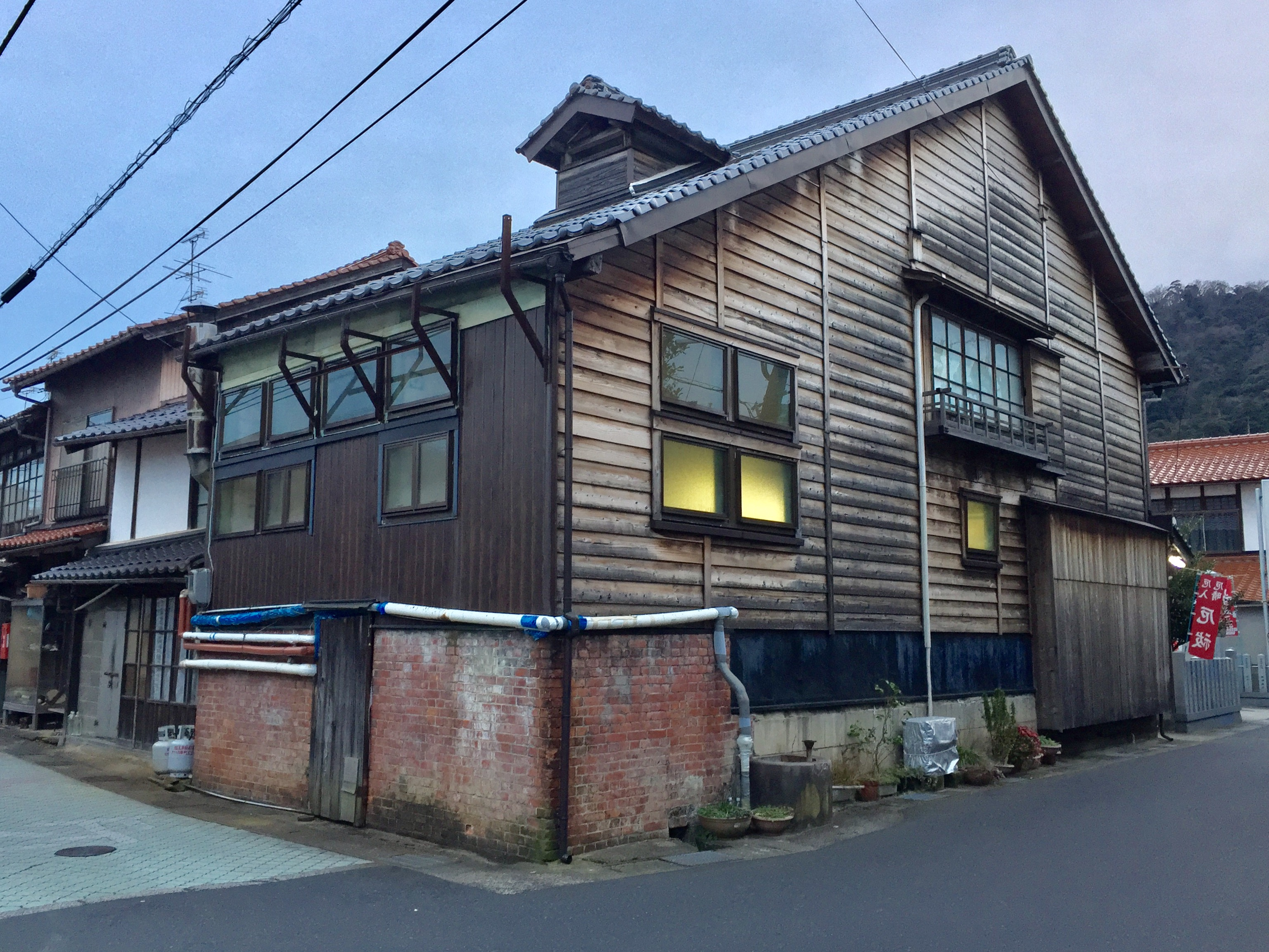 鳥取県倉吉市にある登録有形文化財の銭湯「大社湯（第三鶴の湯）」。外観を北側より撮影。